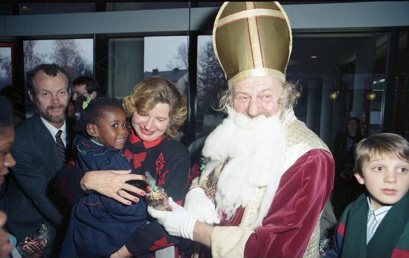 26.11.1988 Barbara Genscher gibt einen vorweihnachtlichen Empfang - mit Nikolaus - für Diplomatenkinder im Konrad-Adenauer-Gymnasium, Bonn-Bad Godesberg.